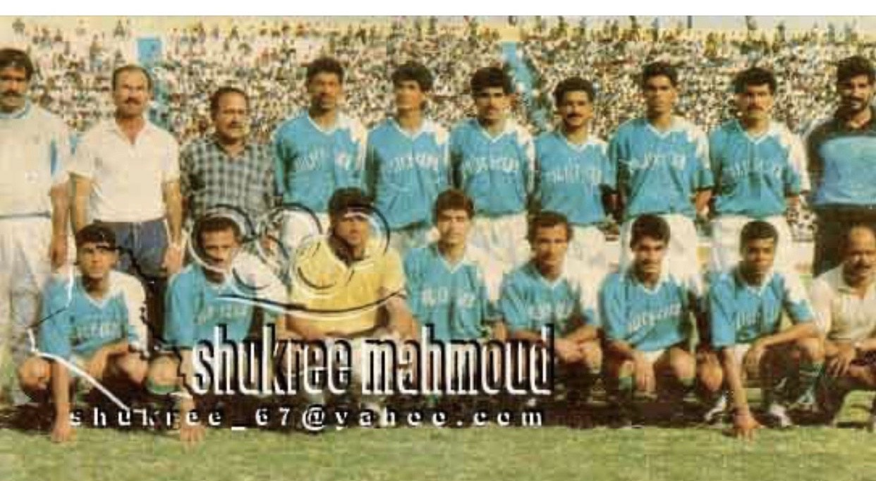 كاظم مجيد عندما كان مشرف الفريق في نادي الشرطة